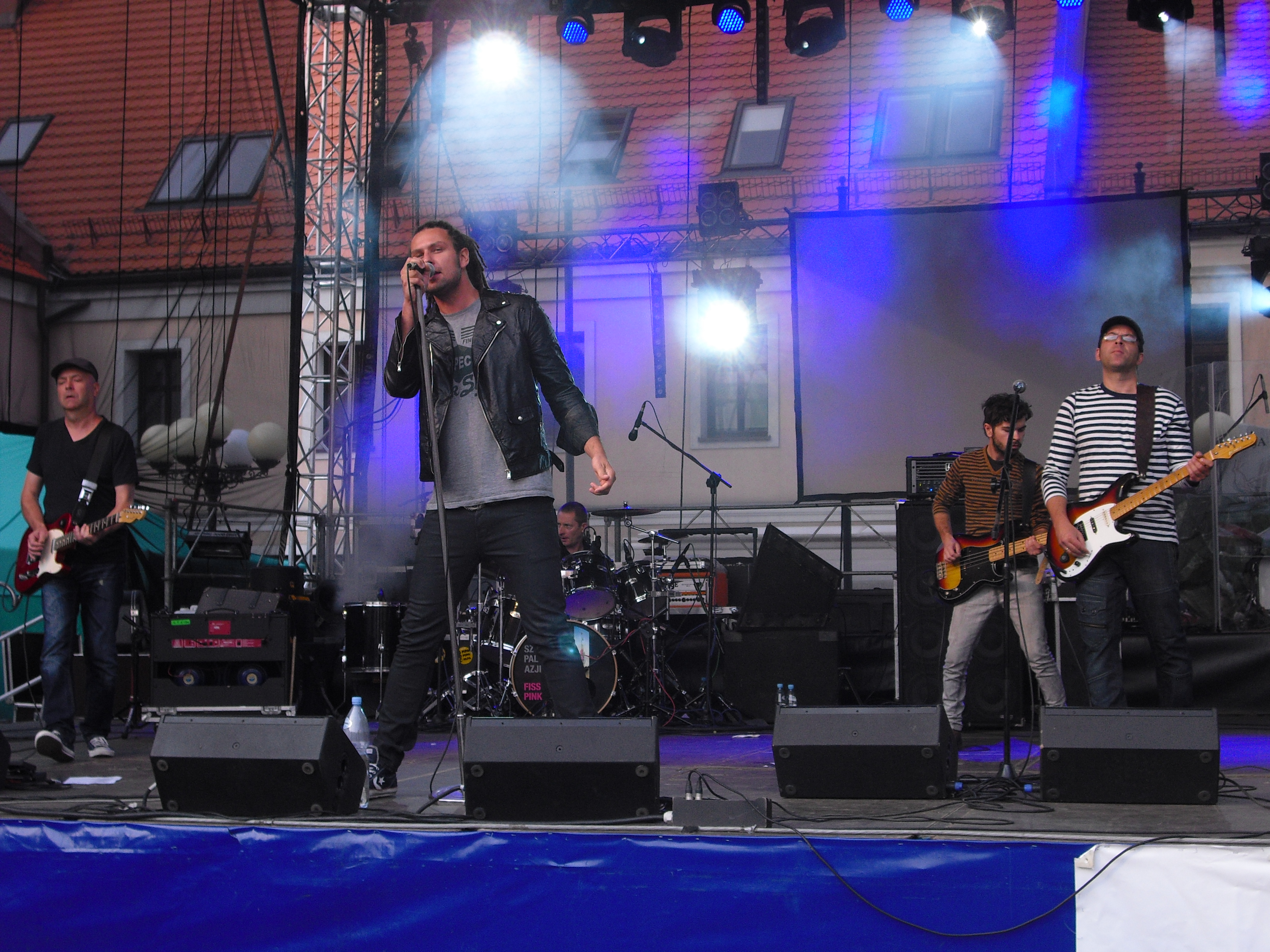 Sztywny Pal Azji, koncert z okazji Dni Mikołowa, 02.09.2012